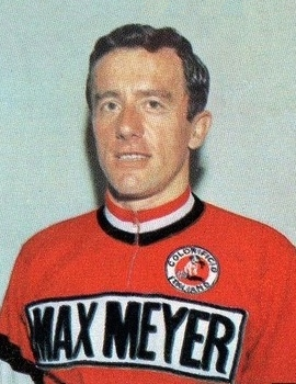 CAMPIONI d. SPORT 1968/69-PANINI-Figurina n.179- DURANTE -ITALIA-CICLISMO-Rec